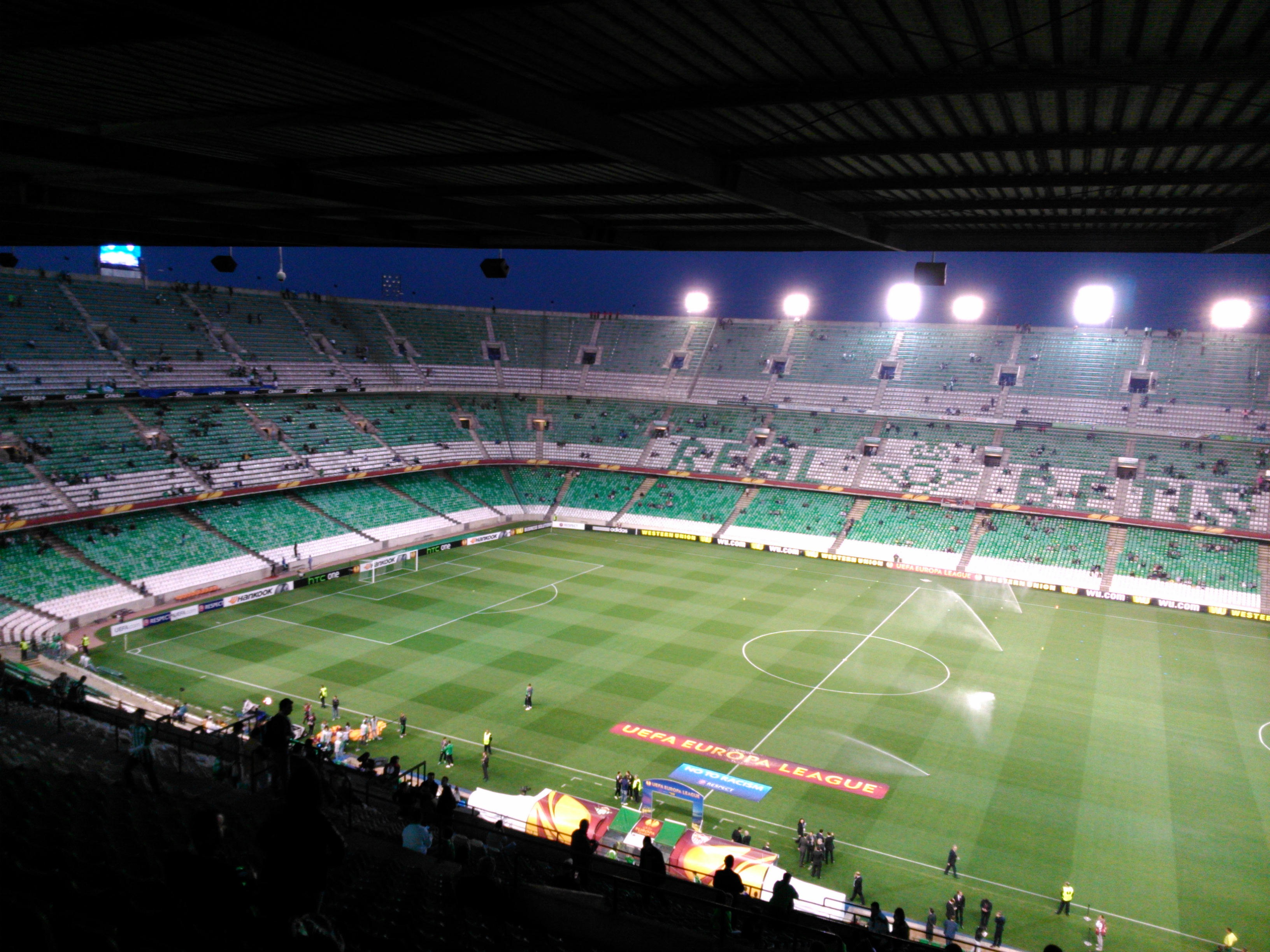 DSC 0067 1